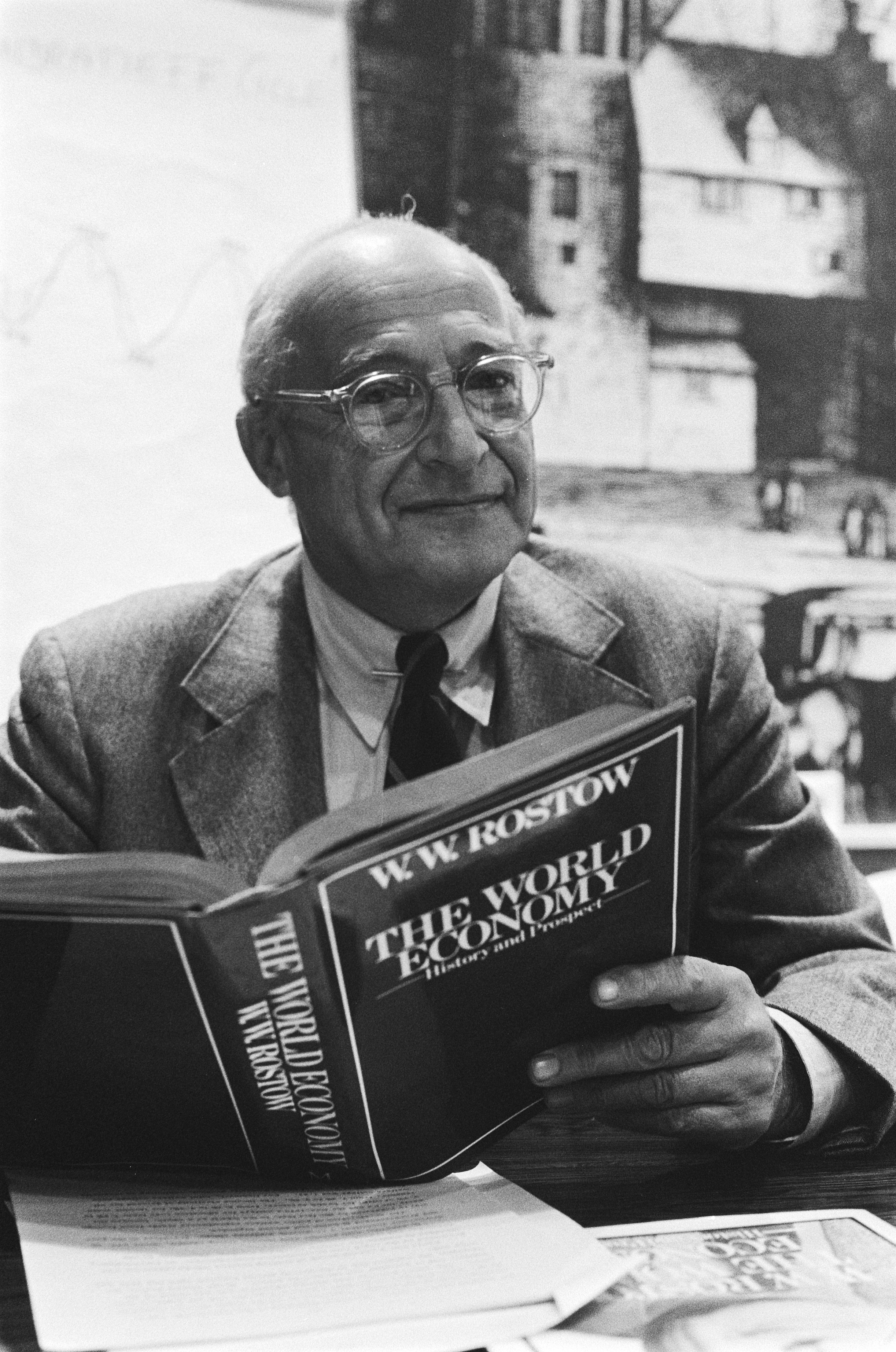 Collectie / Archief : Fotocollectie Anefo Reportage / Serie : [ onbekend ] Beschrijving : Prof. W. W. Rostow (VS) geeft persconferentie over zijn boek "The World Economy" in Den Haag Datum : 14 september 1978 Locatie : Den Haag, Zuid-Holland Trefwoorden : auteurs, boeken, persconferenties, portretten, schrijvers Persoonsnaam : Rostow W W Fotograaf : Verhoeff, Bert / Anefo Auteursrechthebbende : Nationaal Archief Materiaalsoort : Negatief (zwart/wit) Nummer archiefinventaris : bekijk toegang 2.24.01.05 Bestanddeelnummer : 929-8997